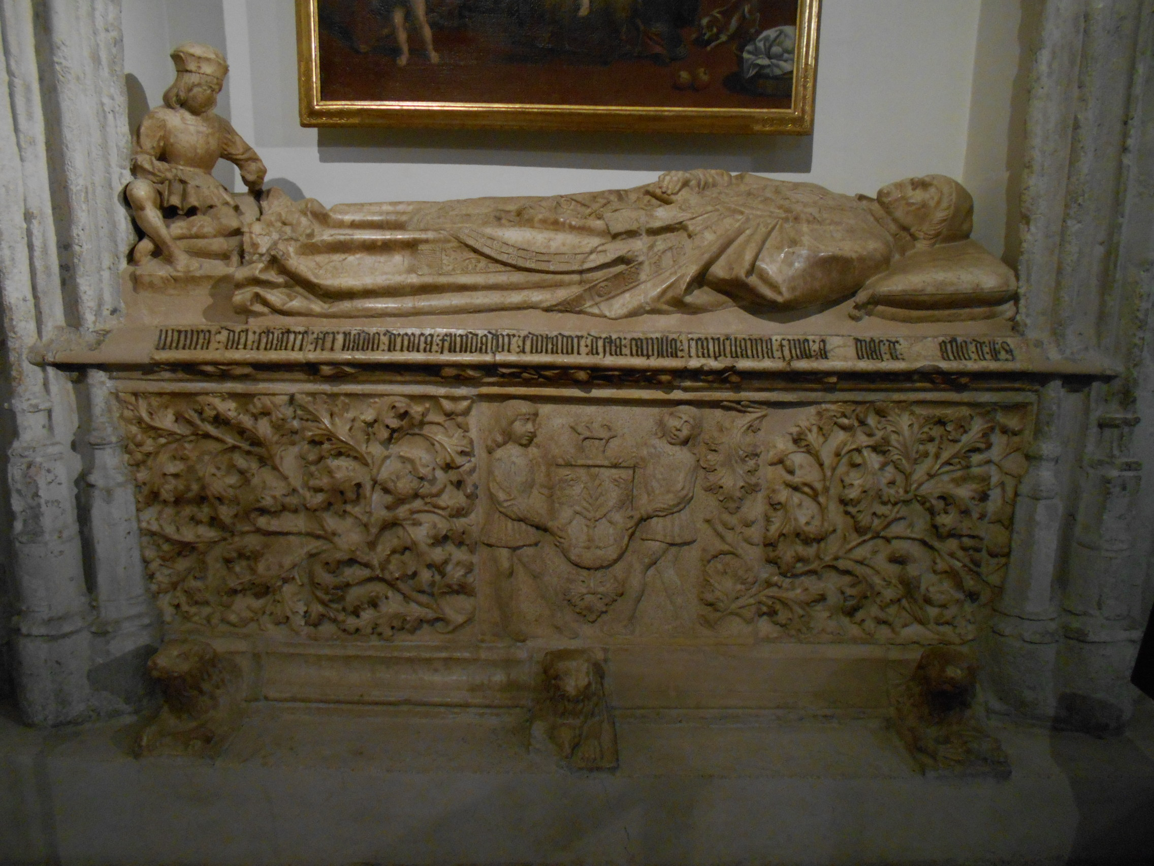 Sepulcro del Chantre de Coria Don Fernando Alonso de Coca. Capilla de los Coca. Iglesia de San Pedro. Ciudad Real